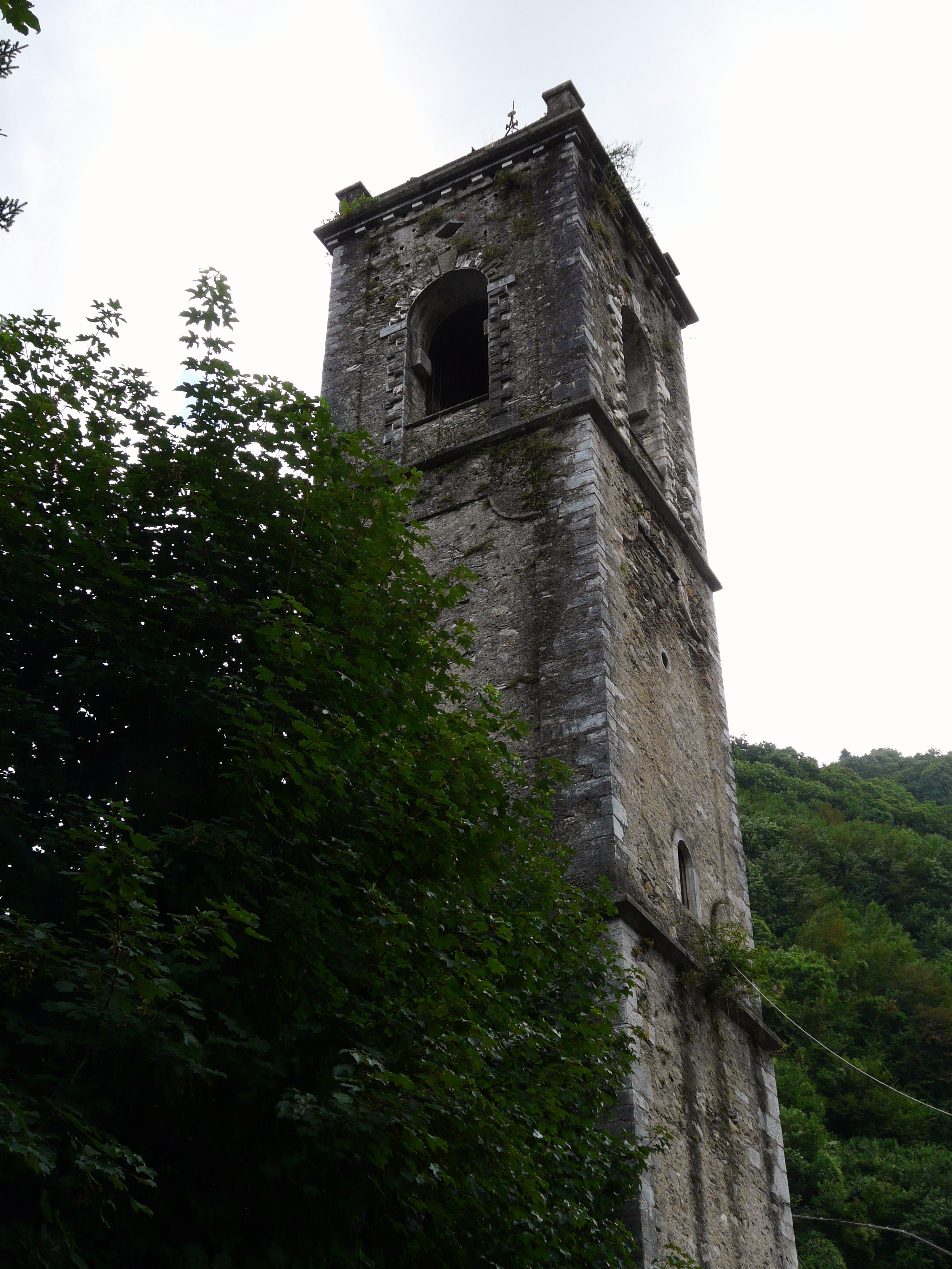 Campanile della chiesa di Mulina, Stazzema, Toscana, Italia